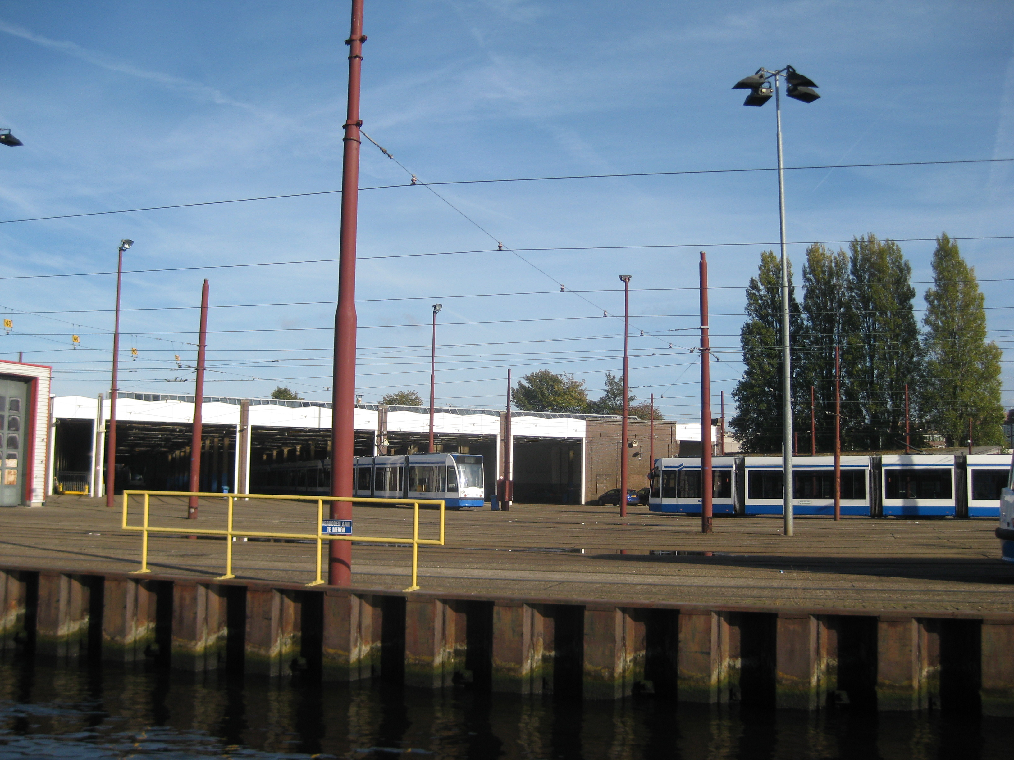 Tramremise Havenstraat in Amsterdam, gezien vanaf de Schinkel